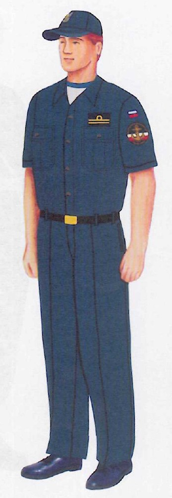 Umundurowanie ćwiczebne żołnierza MW z koszulą